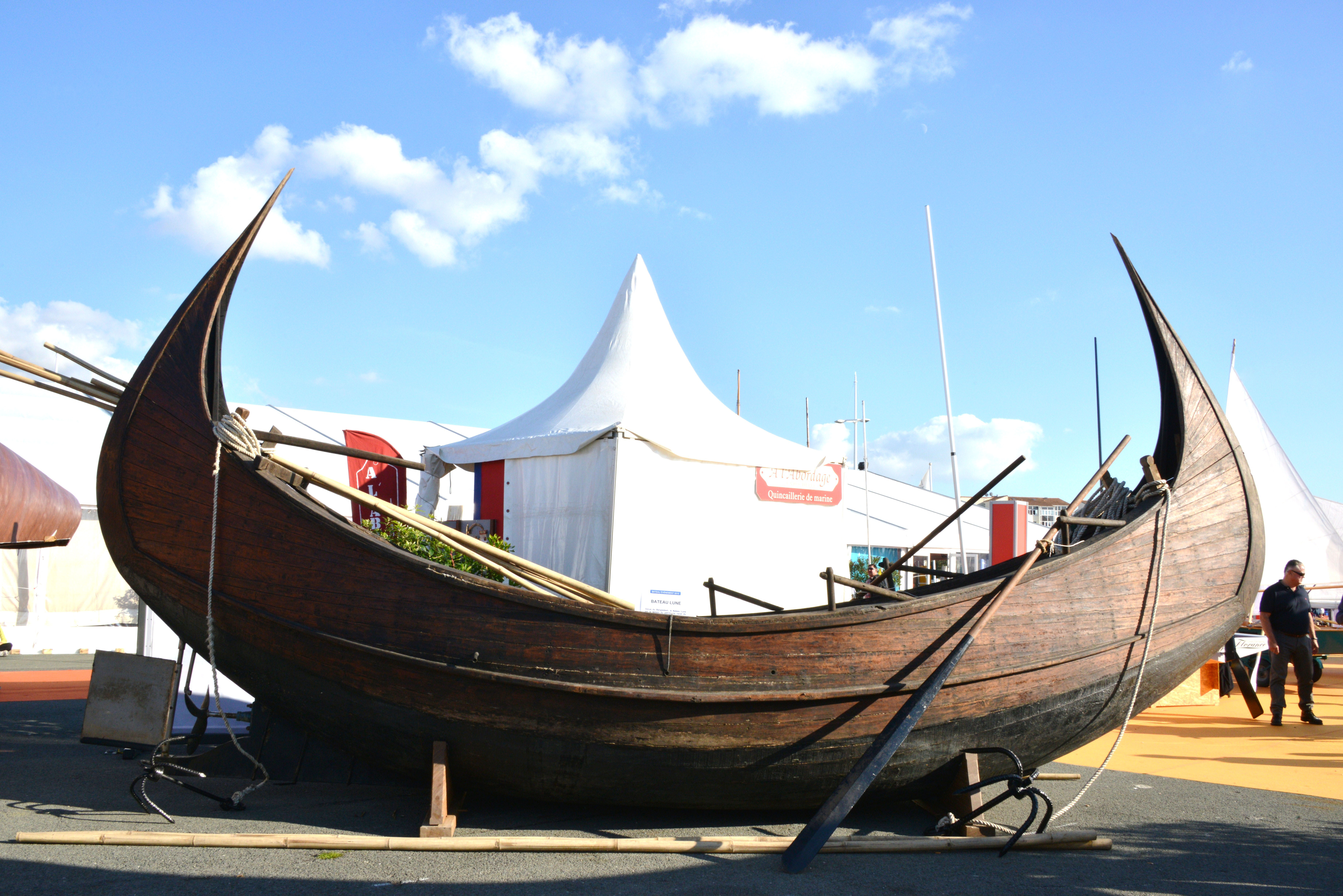 Le bateau-lune de l’Association Watever exposé au Salon Nautique International à Flot de La Rochelle 2015: cette vue longitudinale permet de bien voir la forme en croissant de lune du bateau et les deux cornes. Ce bateau a été construit et lancé en 2013 au chantier naval TaraTari à Chittagong au Bangladesh à l’initiative de Watever. Le bateau-lune est un bateau de pêche traditionnel propre au district de Cox’s Bazar à l’extrême sud-est du Bangladesh. Sa forme permet de passer une barrière sableuse qui produit des déferlantes. La Rochelle, Charente-Maritime, France.